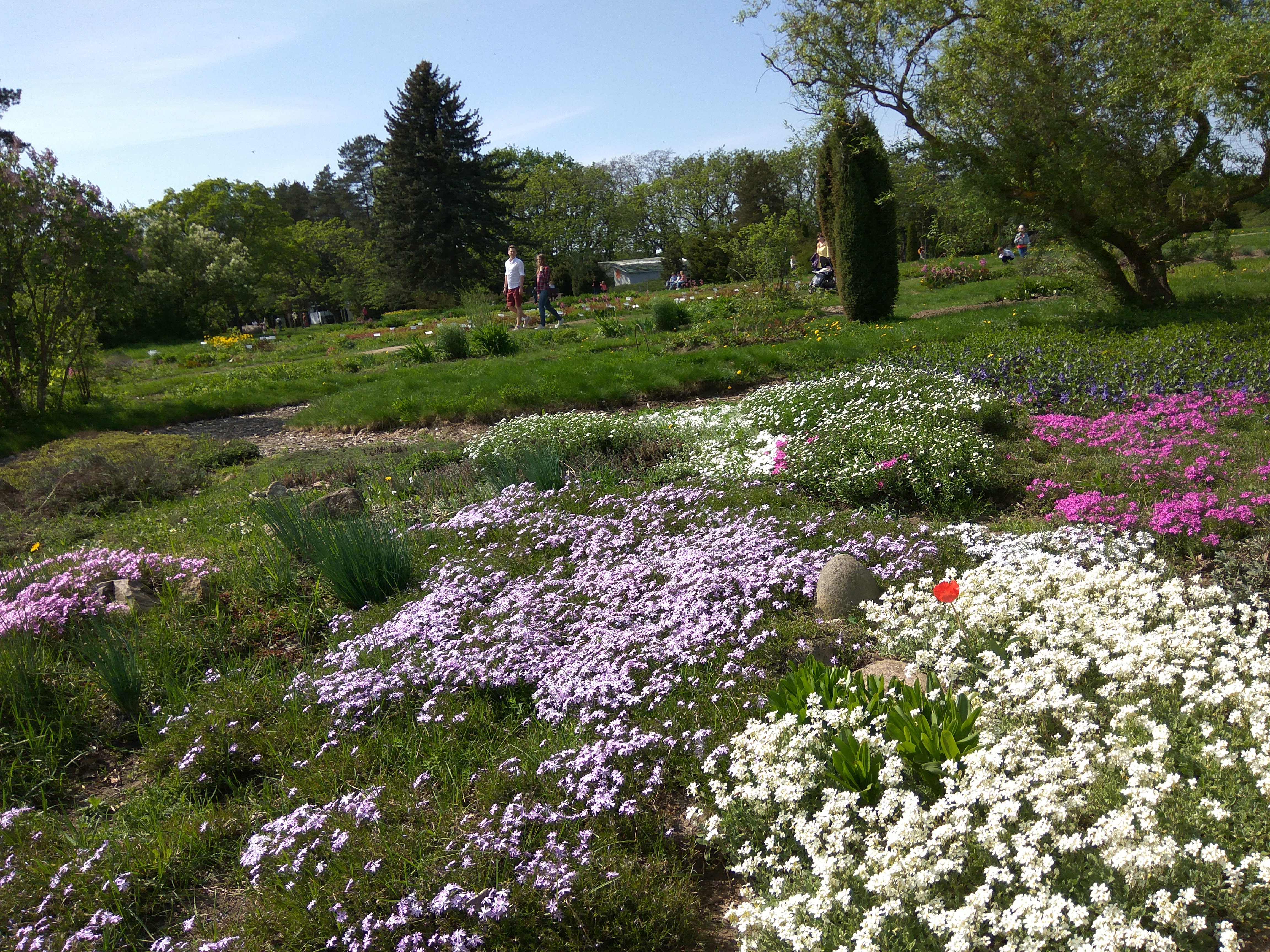 Мінск. Батанічны сад у маі 2018